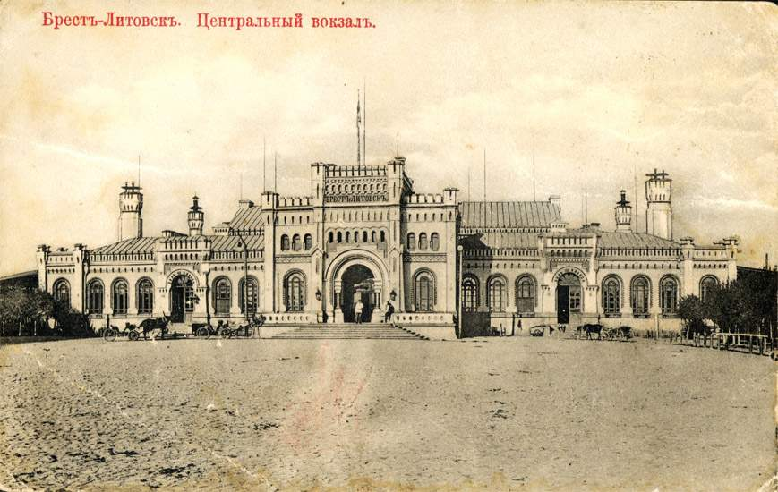 Вокзал станции Брест. Открытка почтовая, до 1915 г.